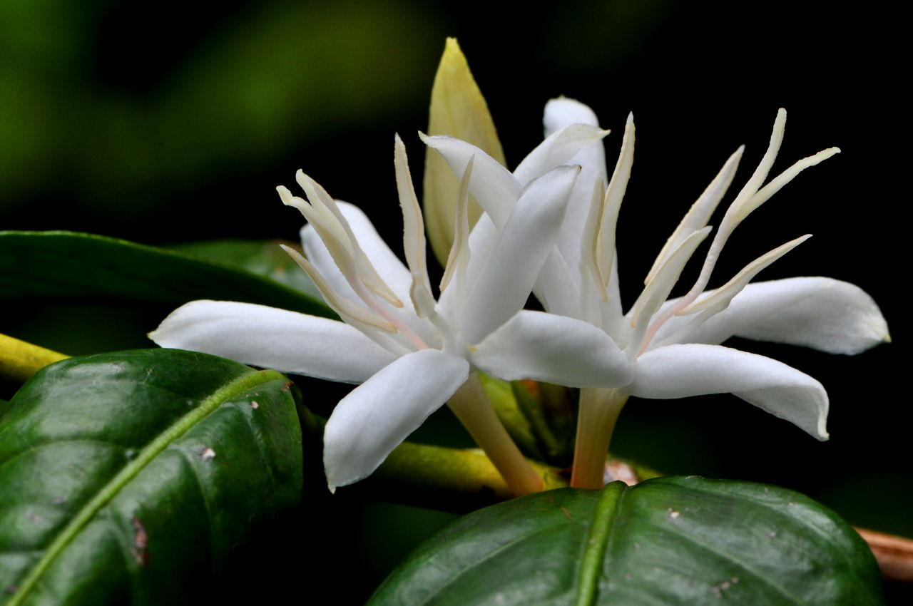 Fleurs de cafeier